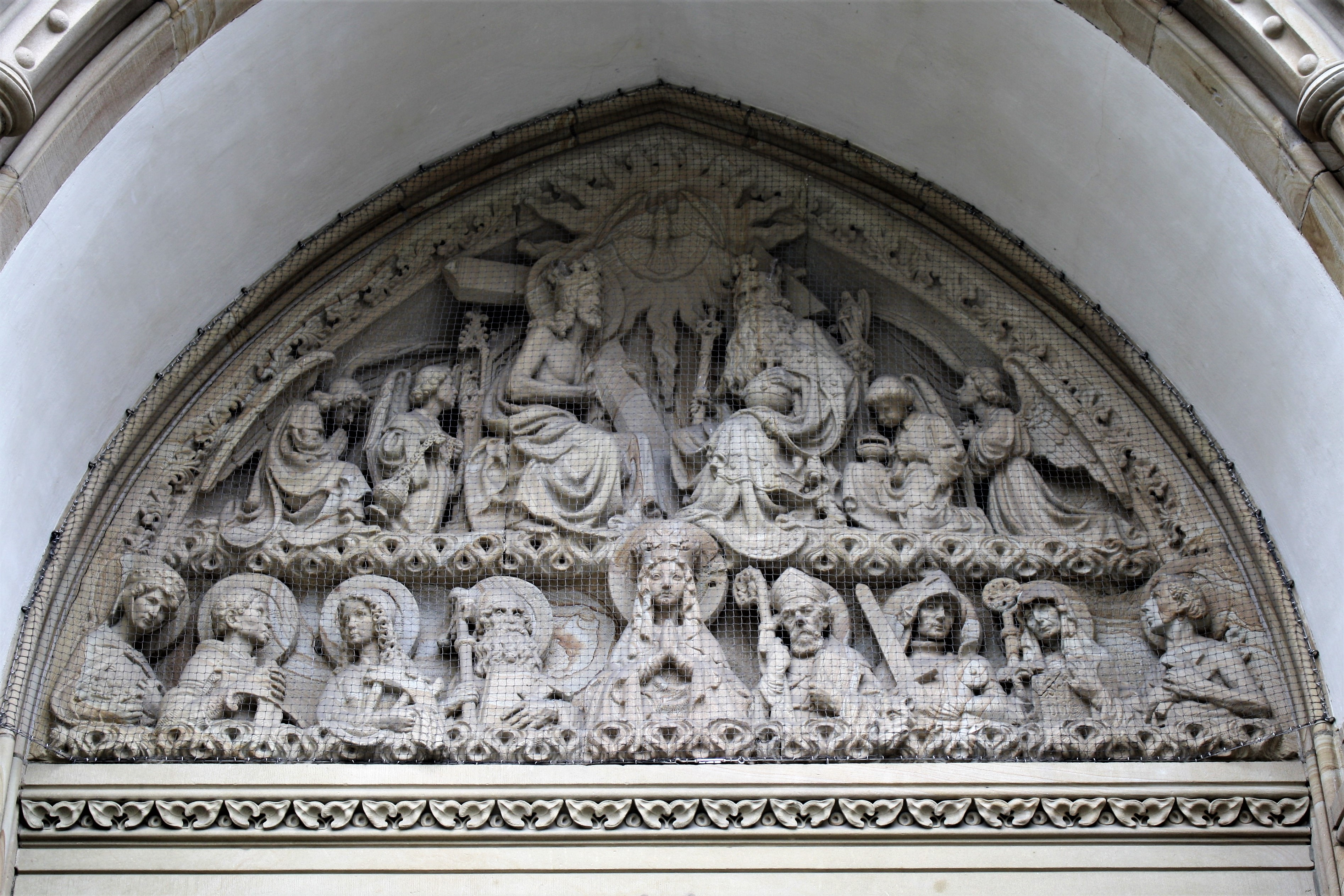 Hauptportaltympanon der Kirche Hl. Dreifaltigkeit Künstler Professor August Weckbecker (1888-1939)